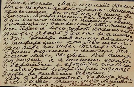 Паштоўка Адама Ягоравіча Багдановіча да Льва Багдановіча з паведамленнем пра смерць Максіма. 21 мая 1917 г. (па старым стылі) Аўтограф А.Я. Багдановіча. На рускай мове